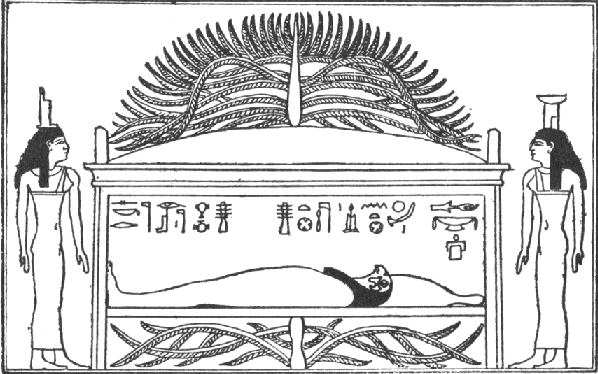 Tombeau d'Osiris sous la garde de ses soeurs à l'ombre d'un arbre sacré